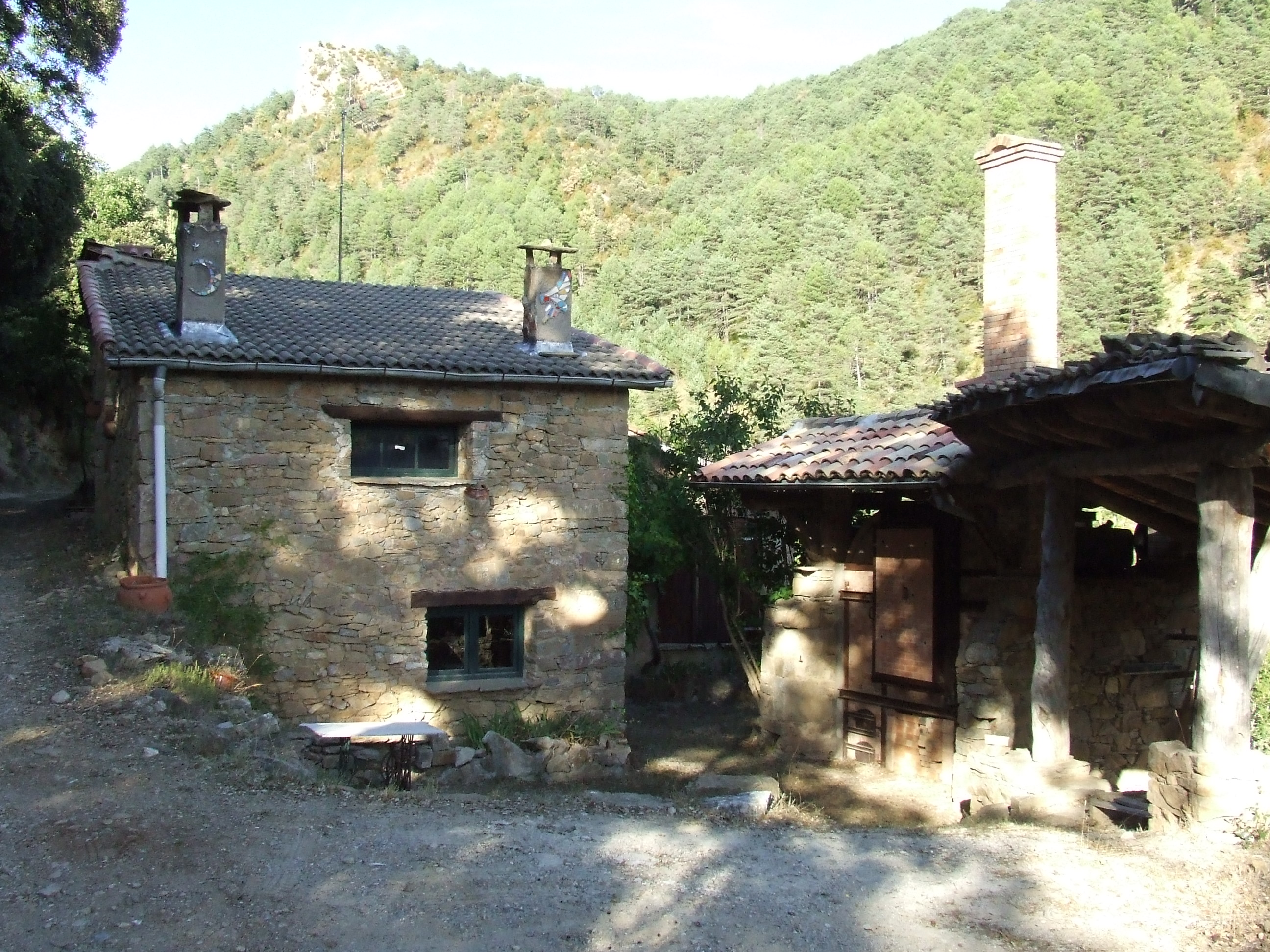 Ca l'Astor (Bóixols, Abella de la Conca, Pallars Jussà)